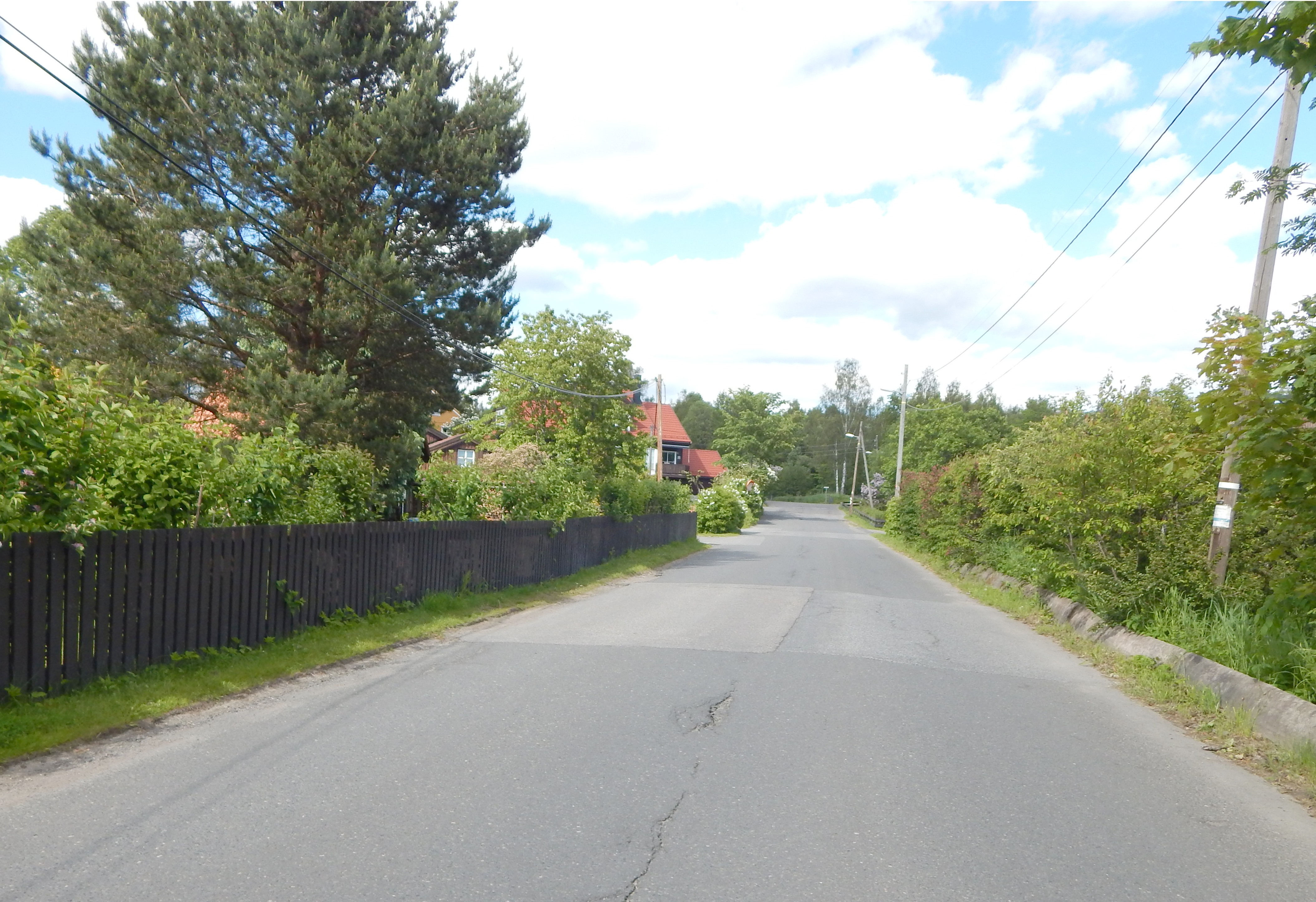 Nordøstre del av Frysjaveien